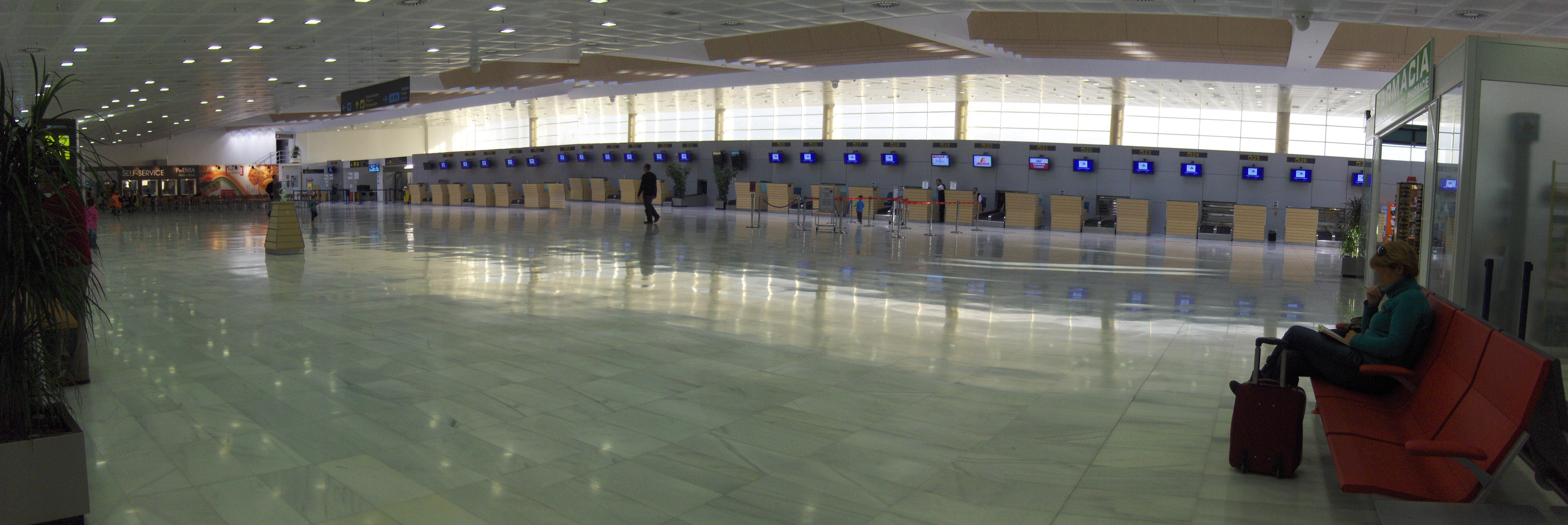 Panorámica del interior de la nueva terminal del aeropuerto de Almería